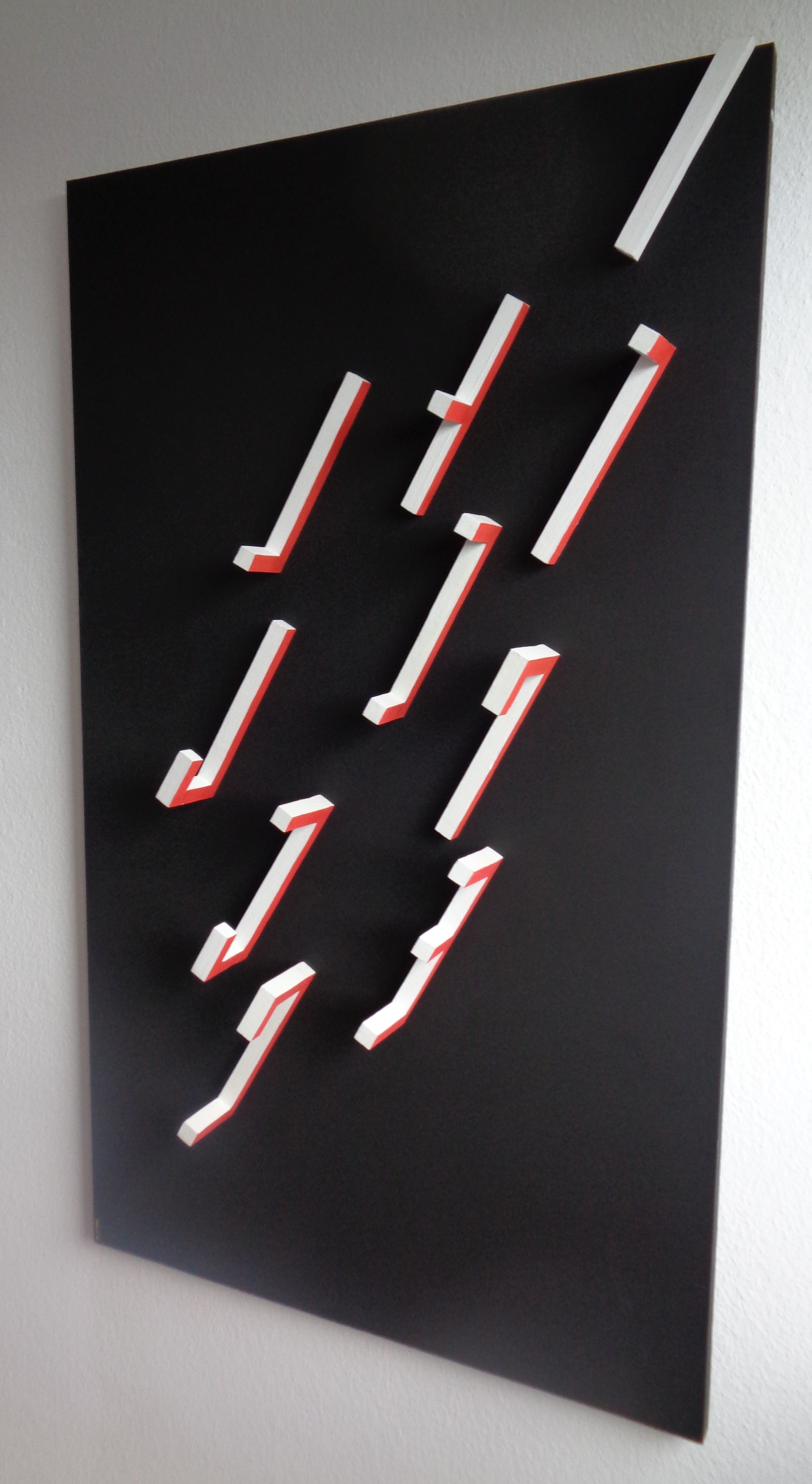 Igor Ganikowskij, "Light, transforming to Words", wood, acrylics, 140x82 cm